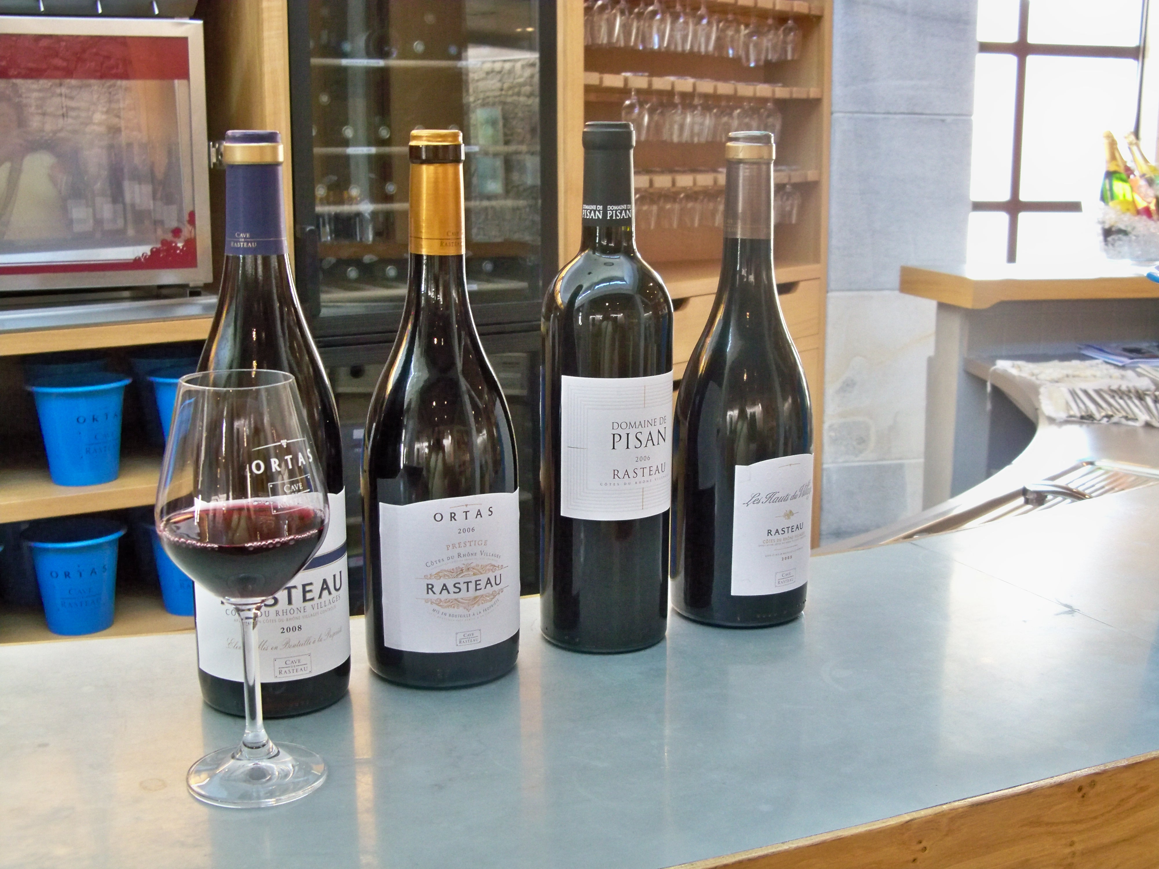 Bouteilles d'AOC Rasteau rouge, Vaucluse, France